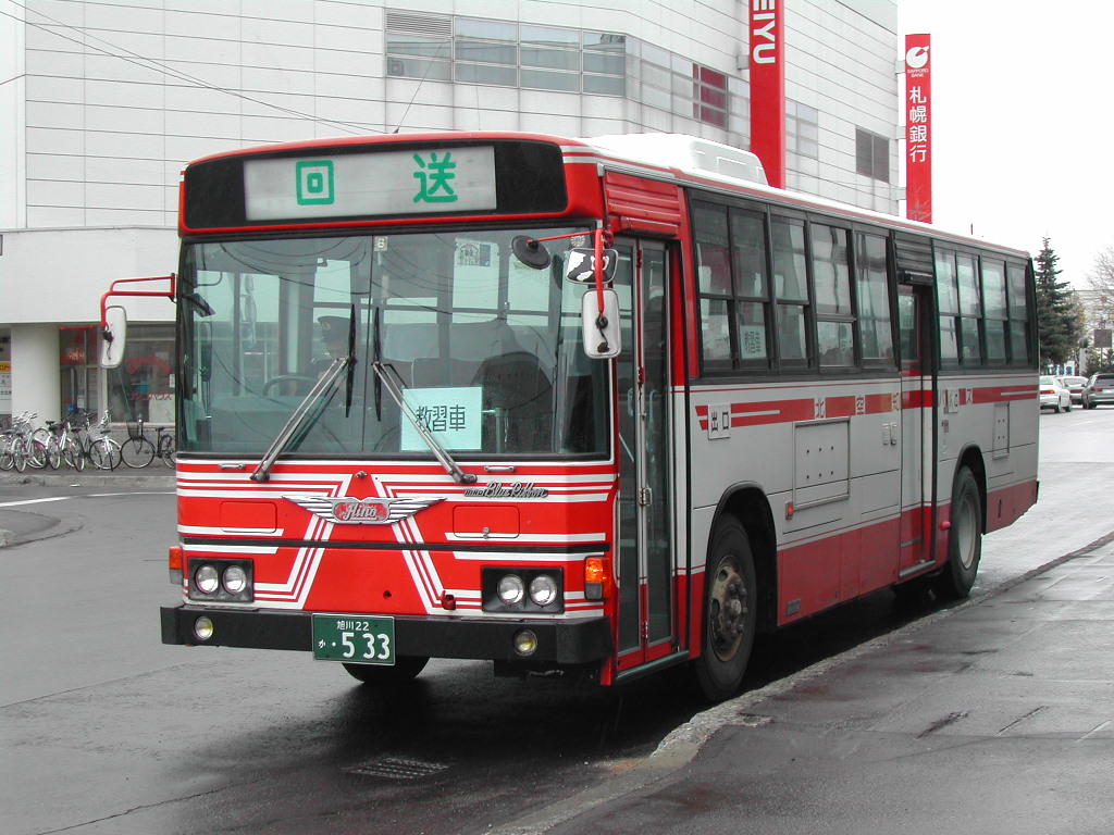 北空知バス路線車 撮影場所失念